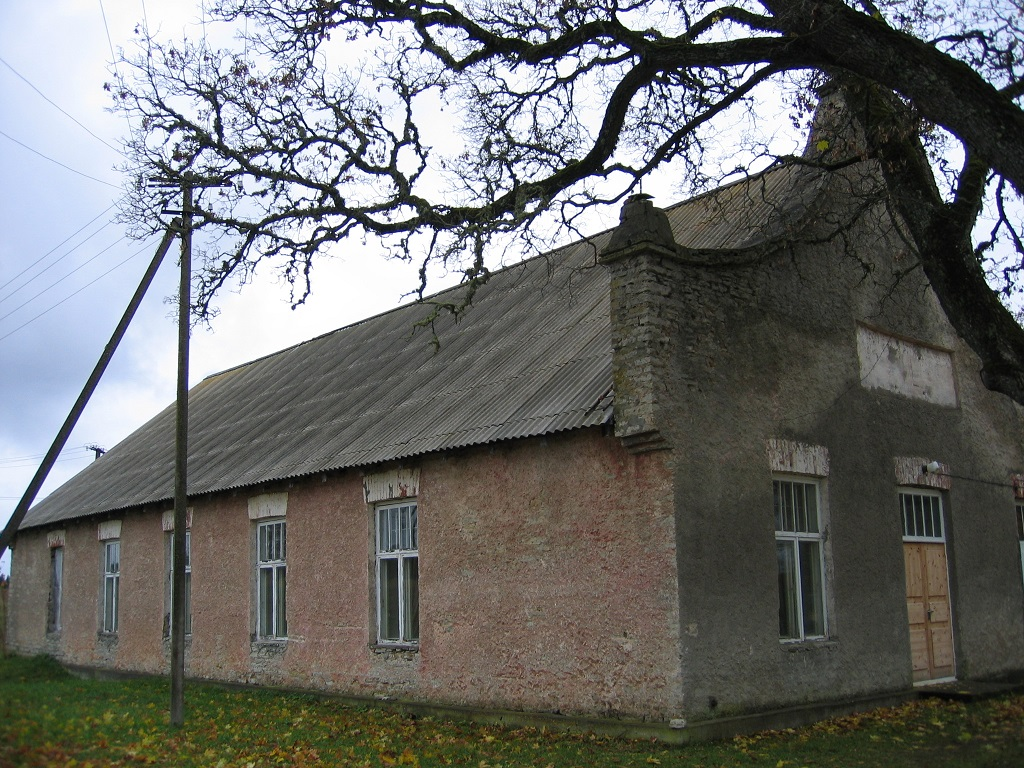 Võhma seltsimaja enne renoveerimist